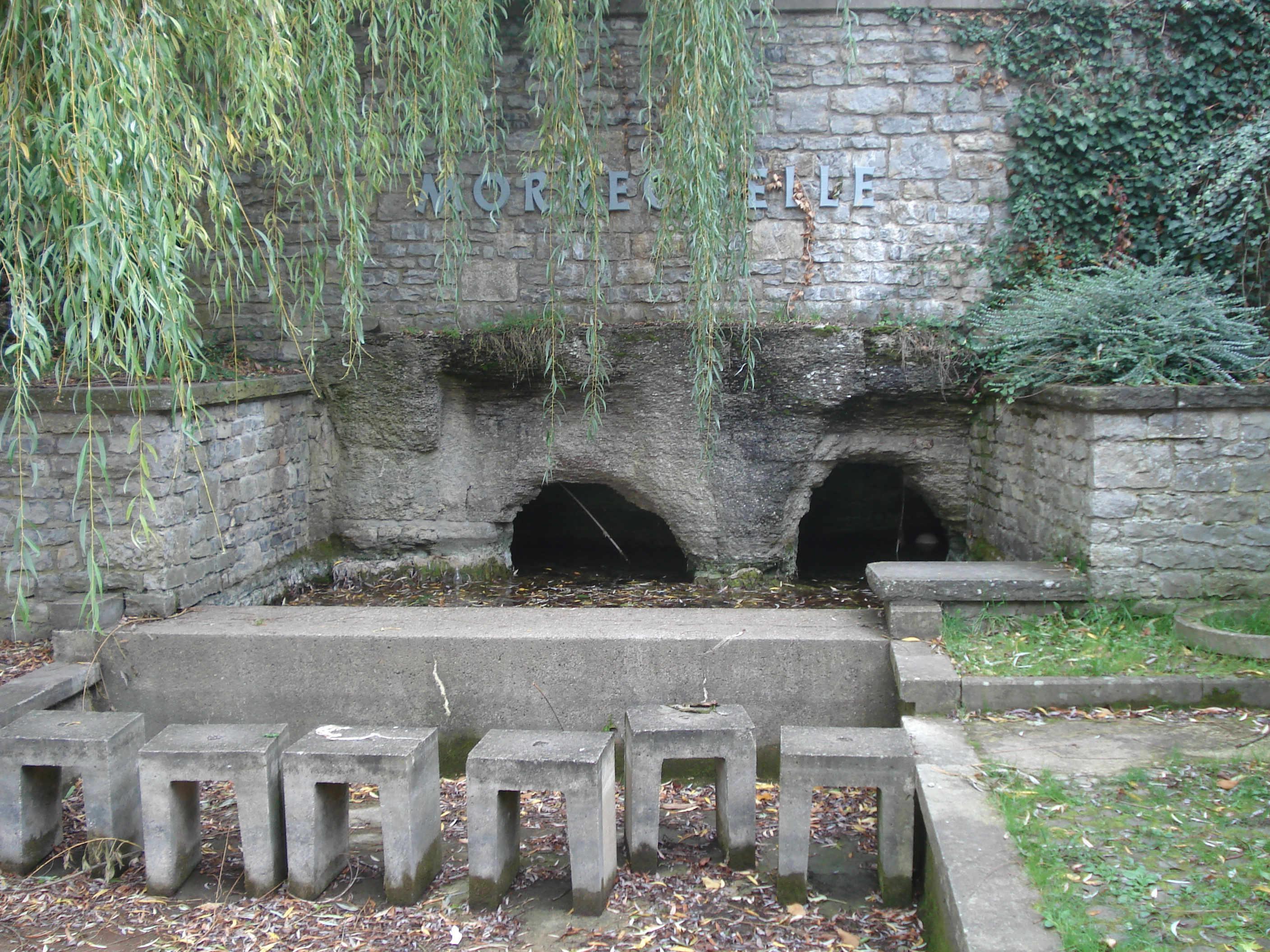 Karstquelle (versiegt) der Morre in Hettingen, baden-württembergischer Odenwald.